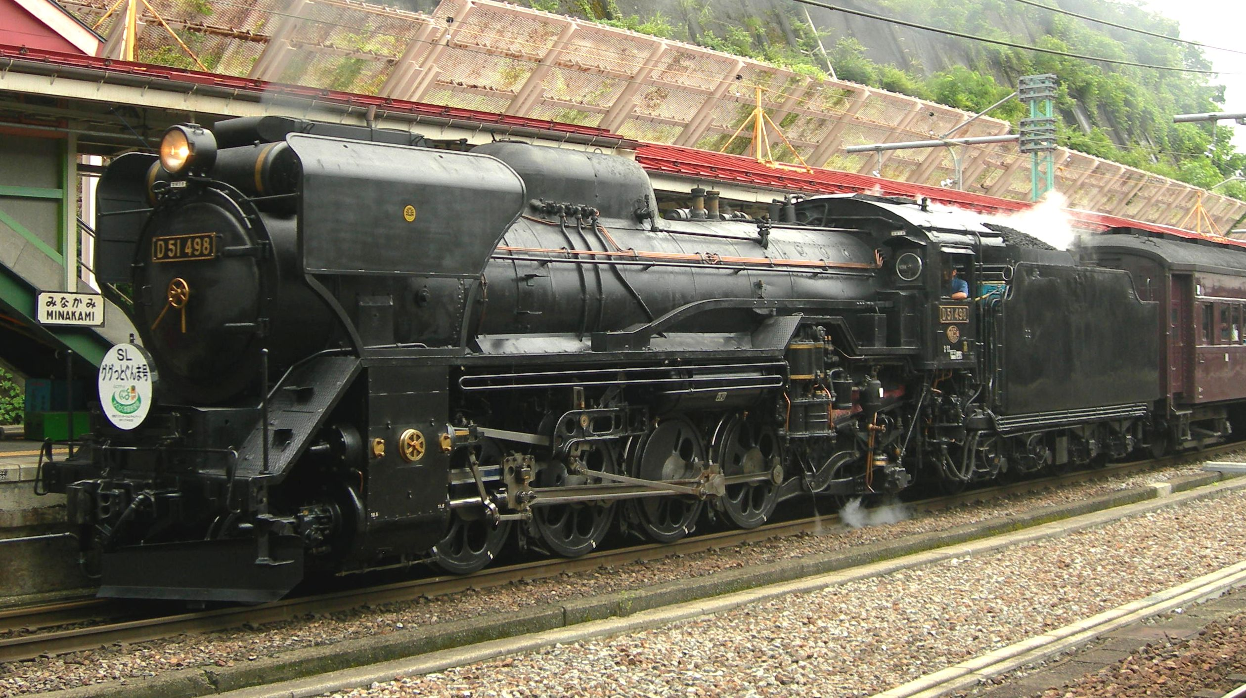 国鉄D51形蒸気機関車